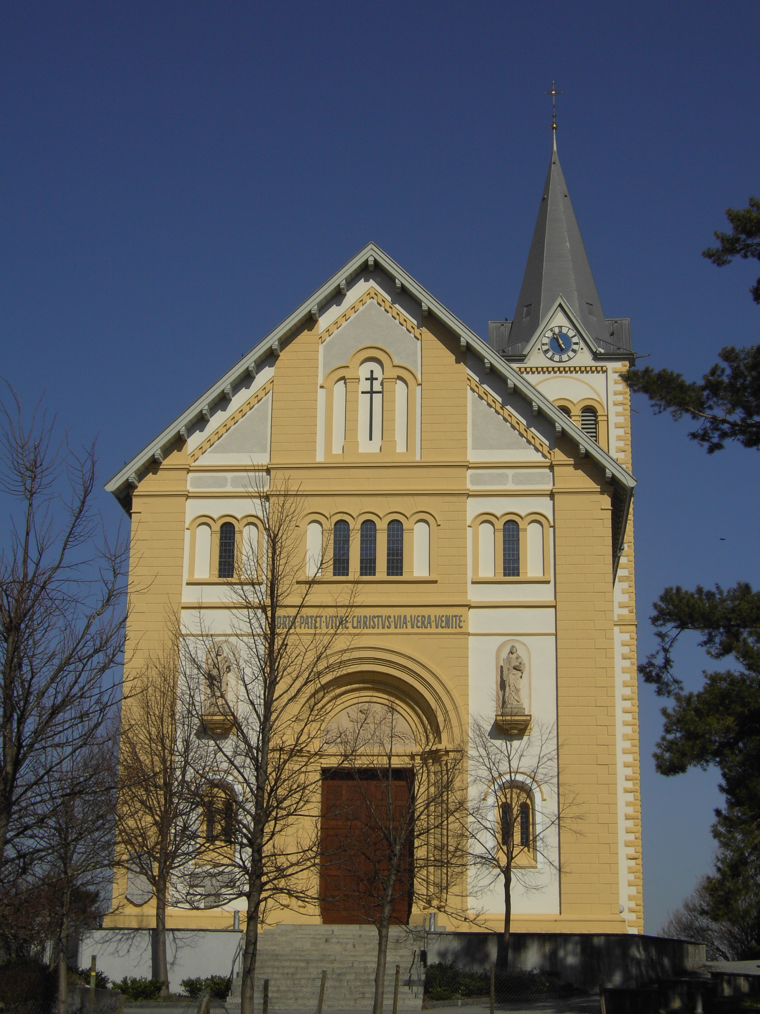 Church of Reichenburg SZ in Switzerland